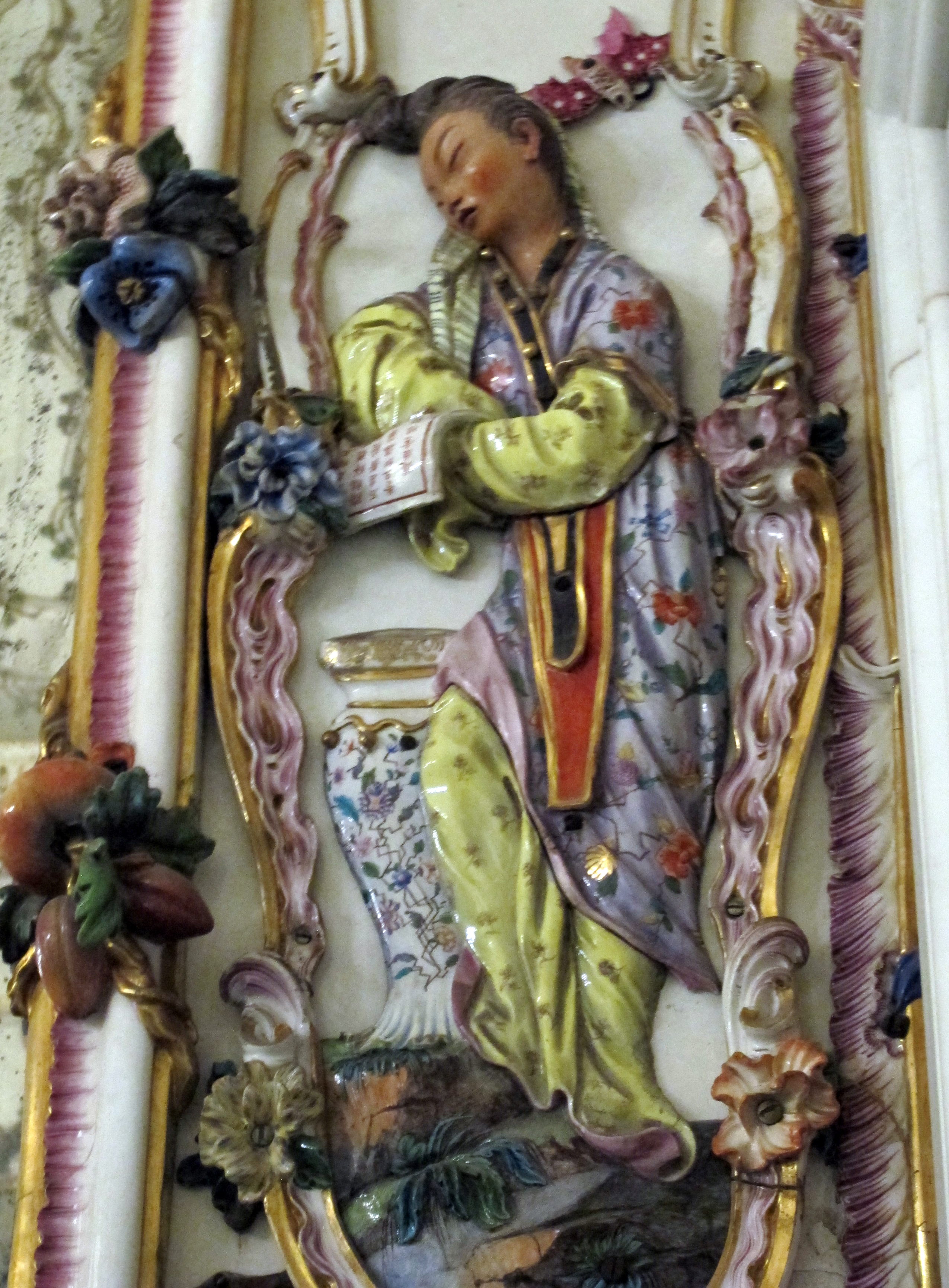 Appartamento Reale (Museo di Capodimonte)